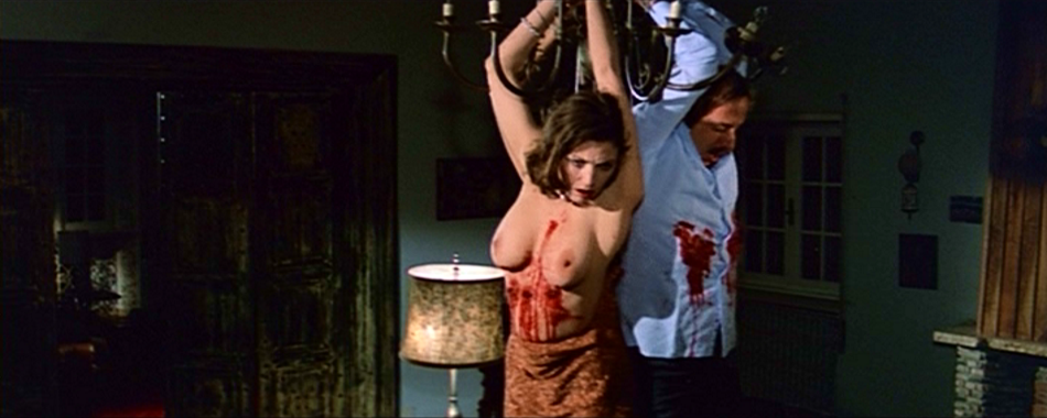 Screenshot dal film Milano odia: la polizia non può sparare di Umberto Lenzi